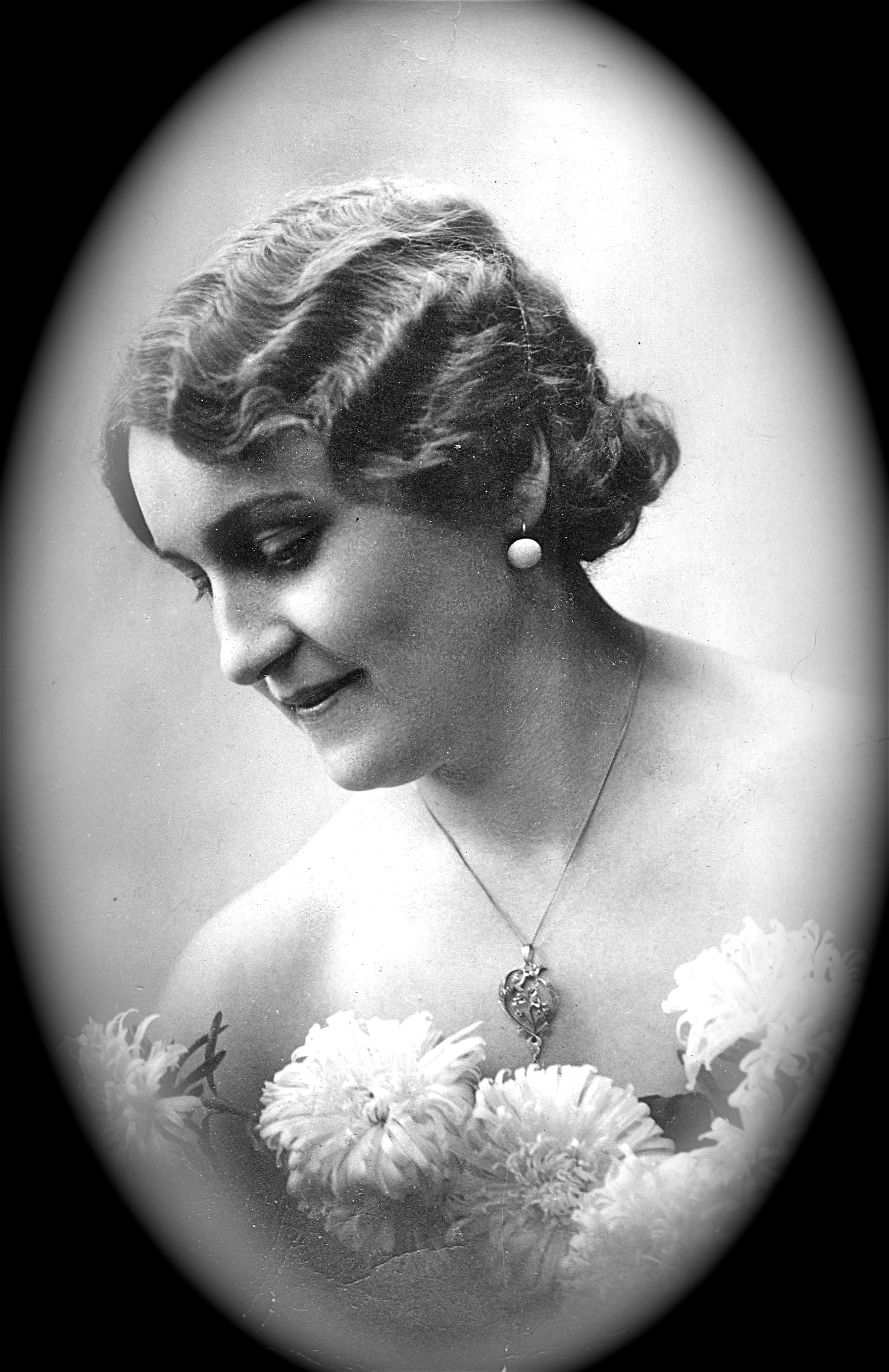 Soja Müller (geb. Prokopowa/Prokopowitsch) Foto ca. aus den 1930-er Jahren (geb. 11.03.1915 - 23.01.2008)